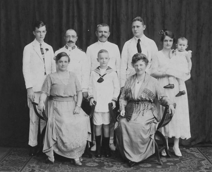 foto. Portret van een Europese familie in Batavia